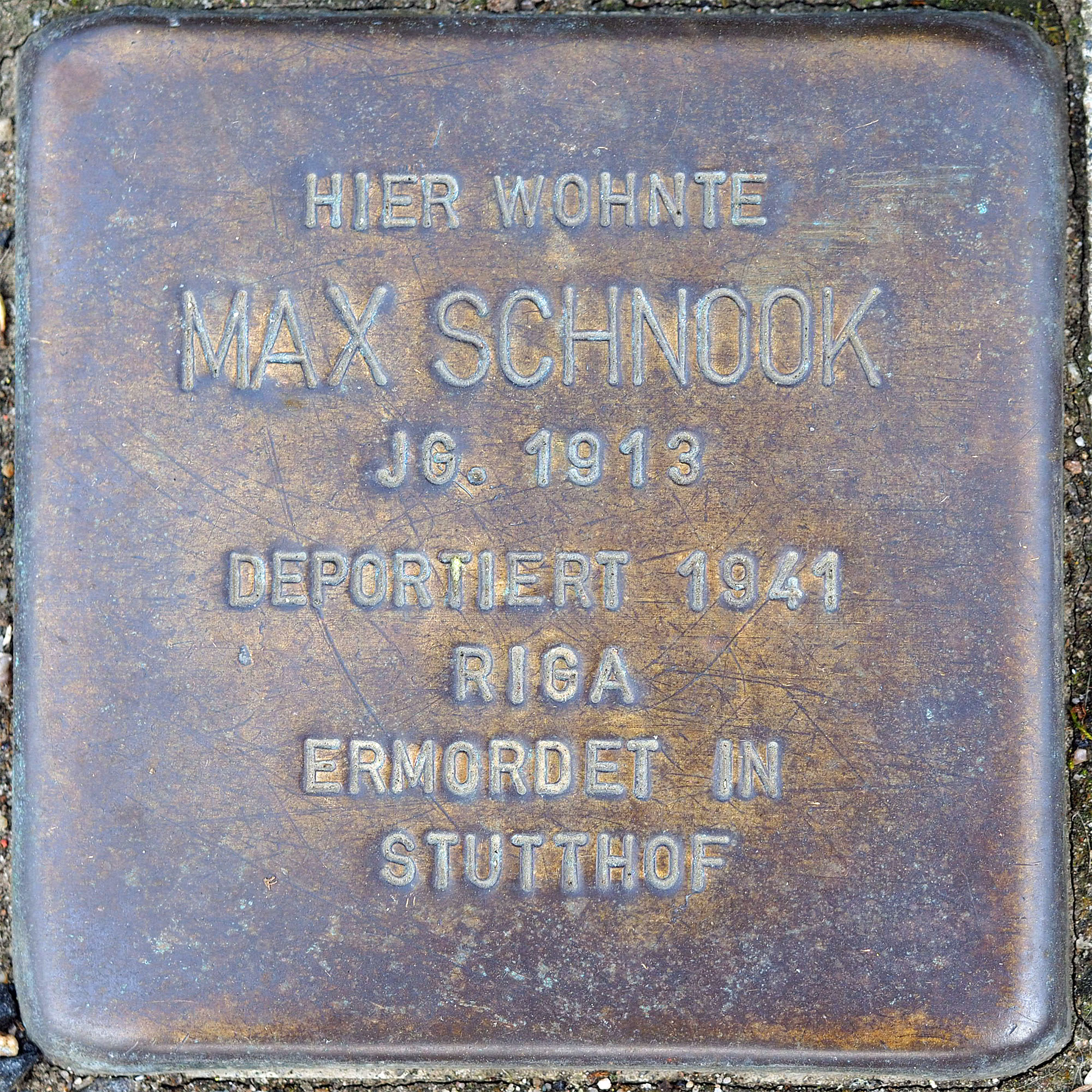 Stolpersteine Korschenbroich: Schnook, Max